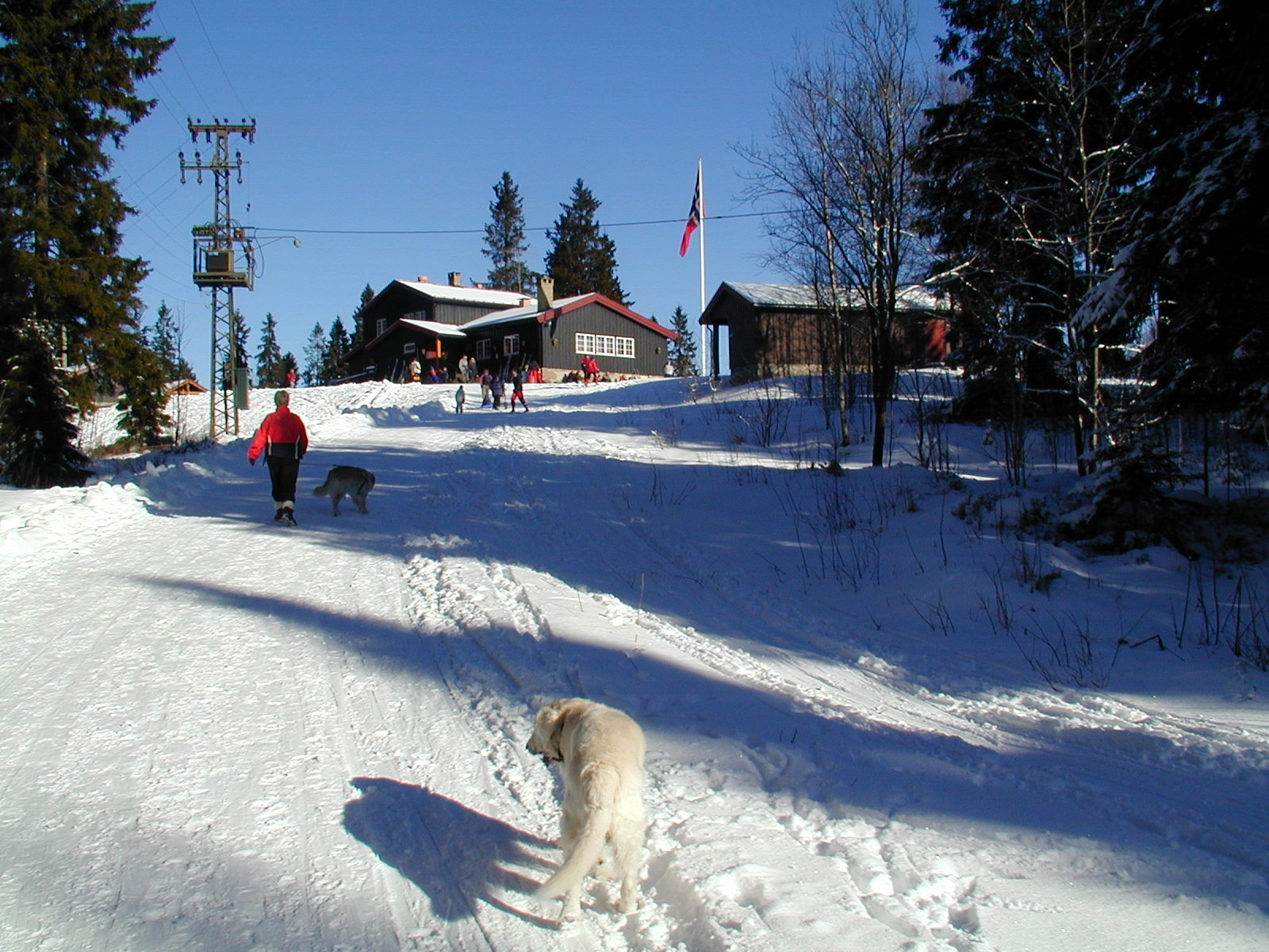 Lilloseter i Lillomarka